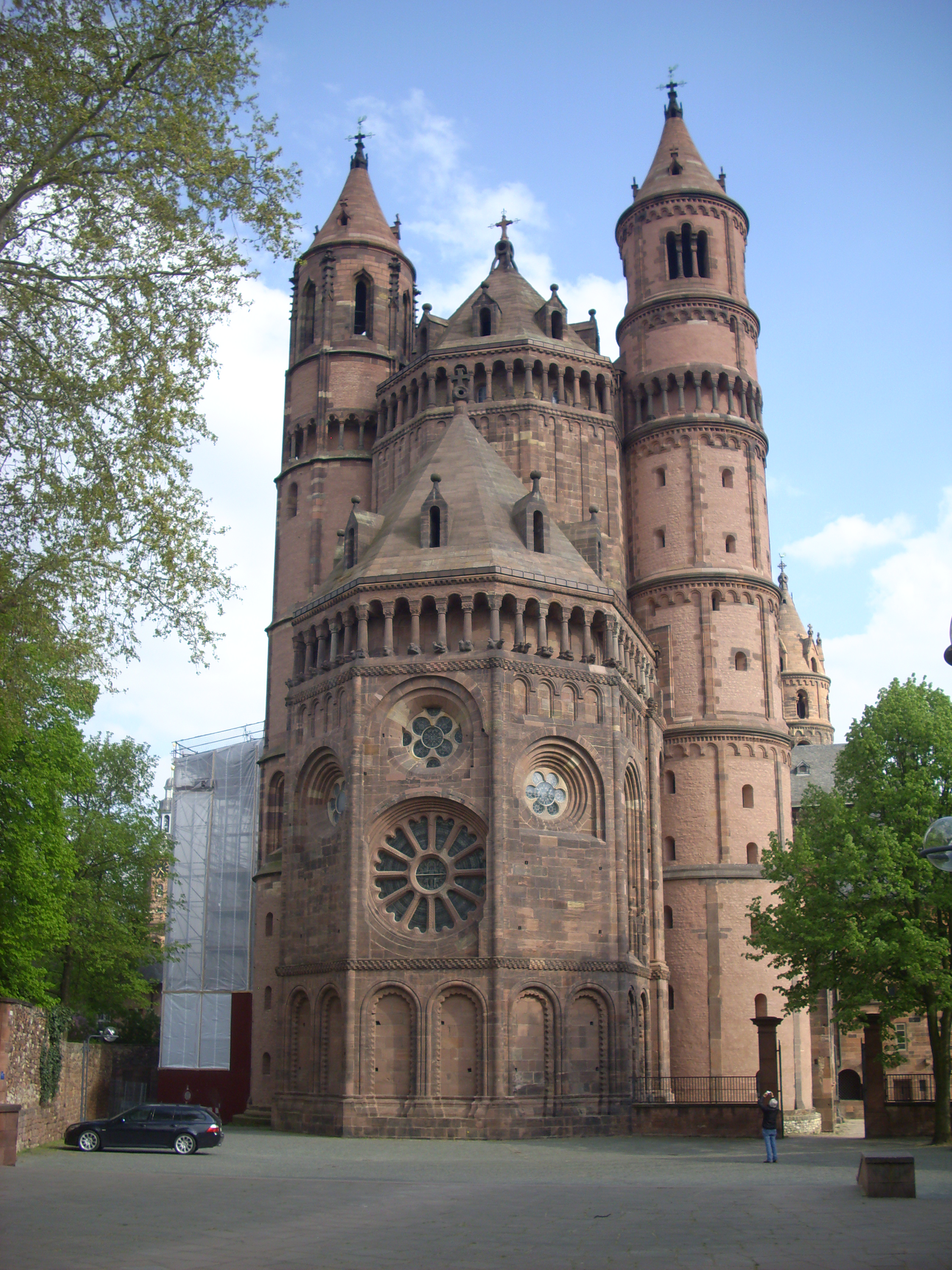 Wormser Dom, Ansicht von Westen (Westchor).